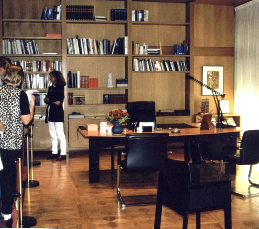 Bundeskanzleramt Bonn, Schreibtisch des Bundeskanzlers Gerhard Schröder